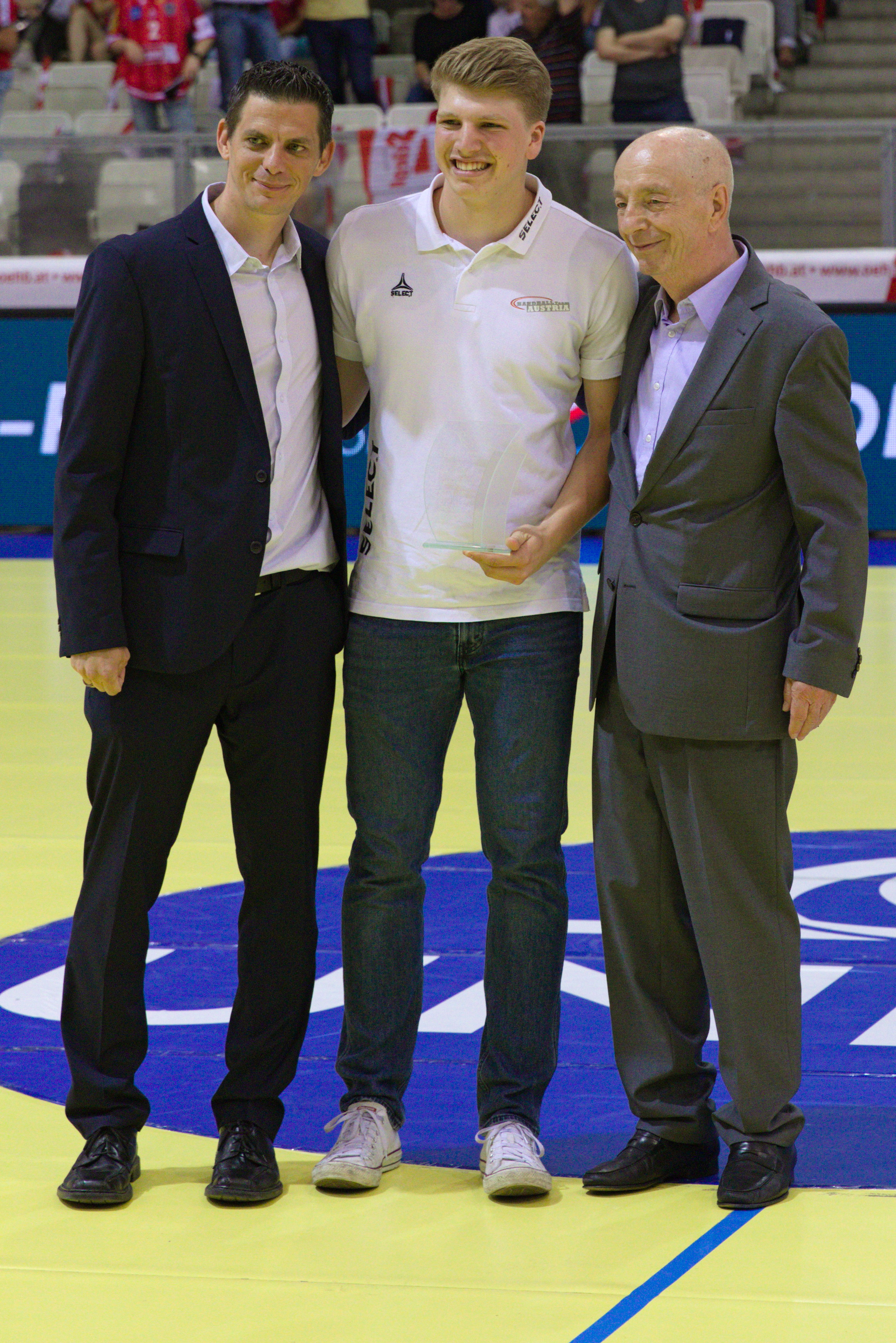 Handball-WM-Qualifikationsspiel zwischen Österreich und Weißrussland in Wien, 13. Juni 2018: Lukas Hutecek (Mitte) wird als Newcomer des Jahres ausgezeichnet, flankiert von Bernd Rabenseifner (links) und Gerhard Hofbauer (rechts)